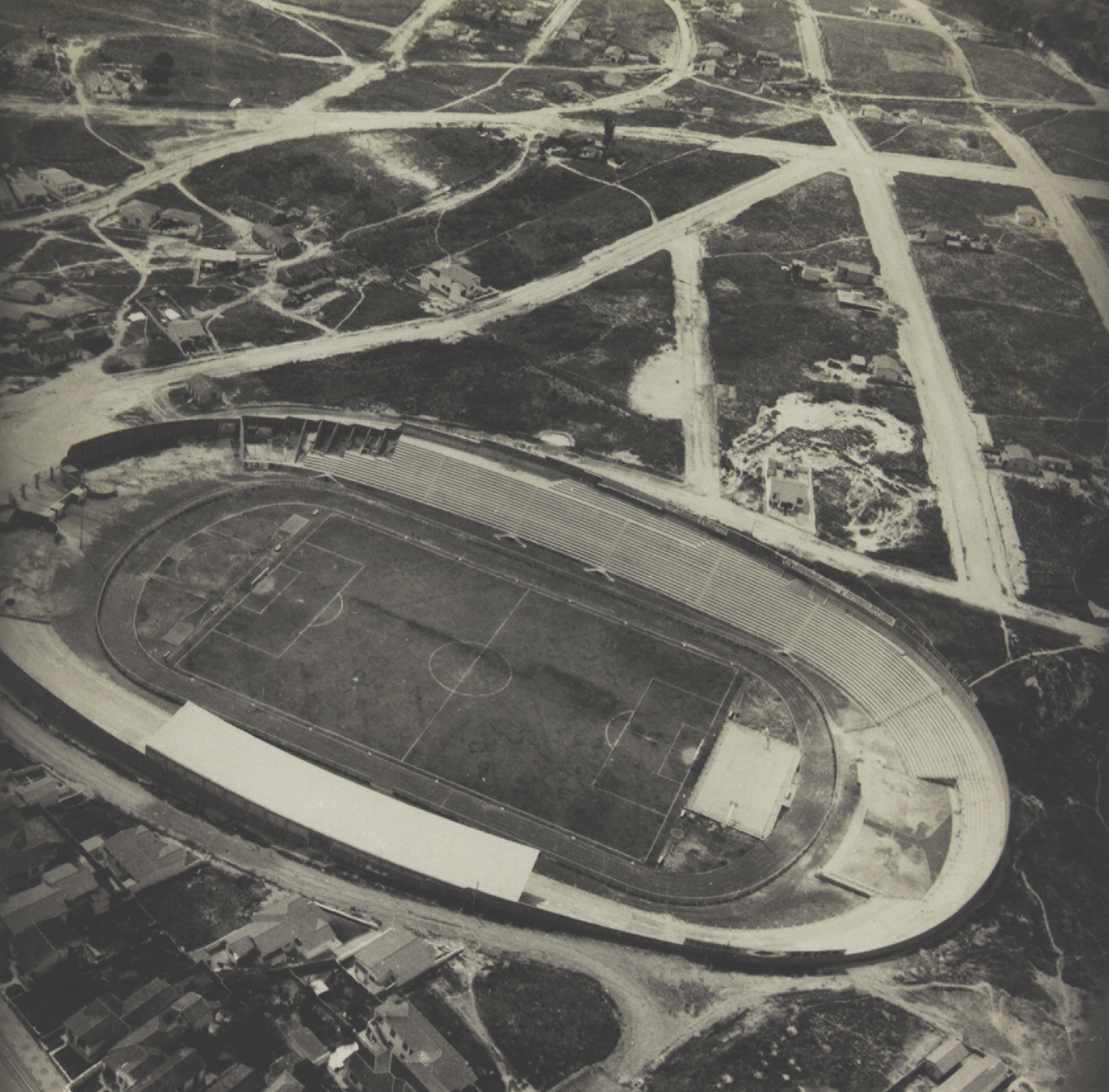 Obra que integra o acervo do Museu Paulista da USP. Coleção Werner Haberkorn